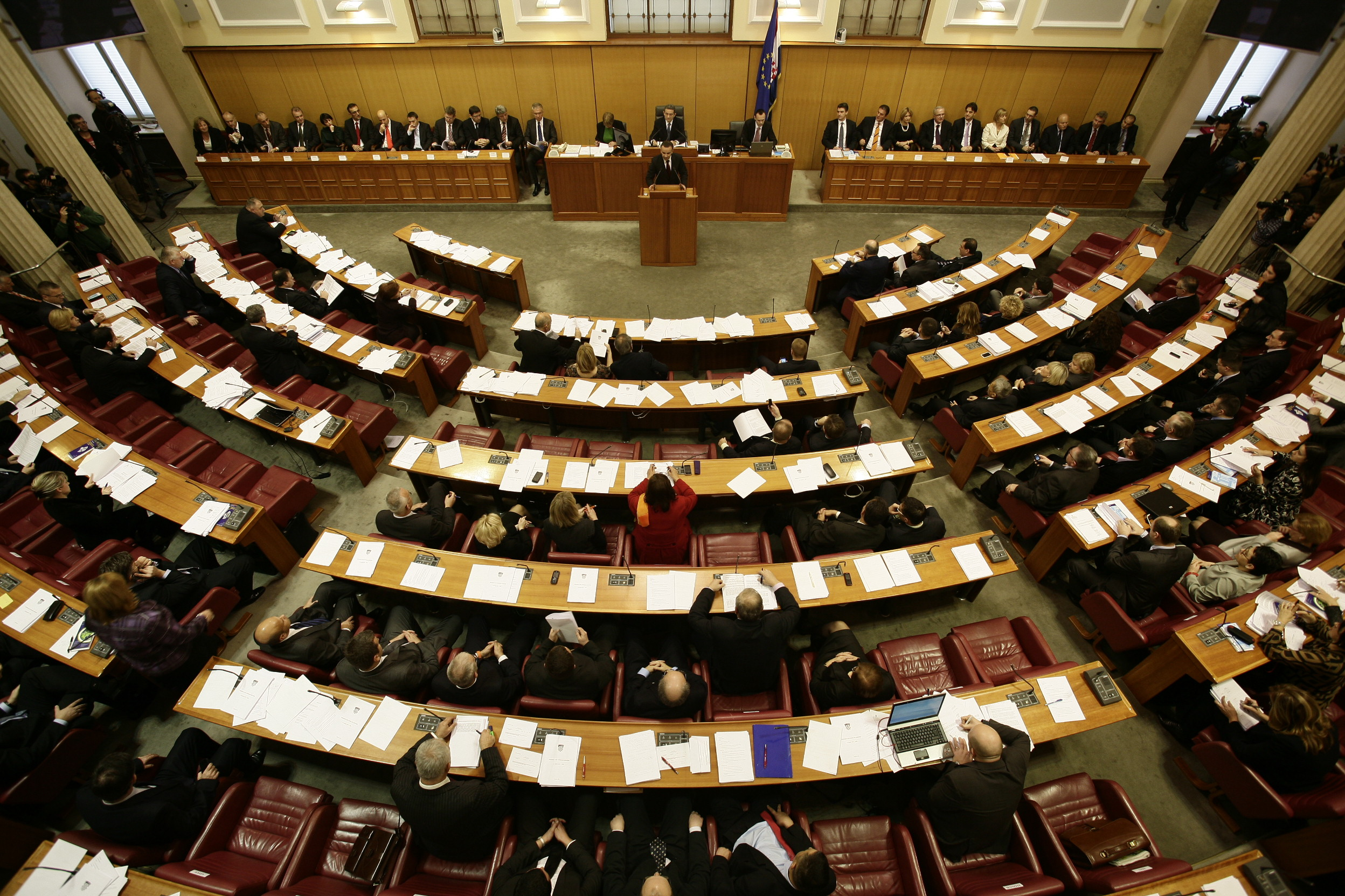 Predstavljanje nove Vlade RH